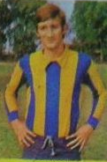 Alberto Fanesi